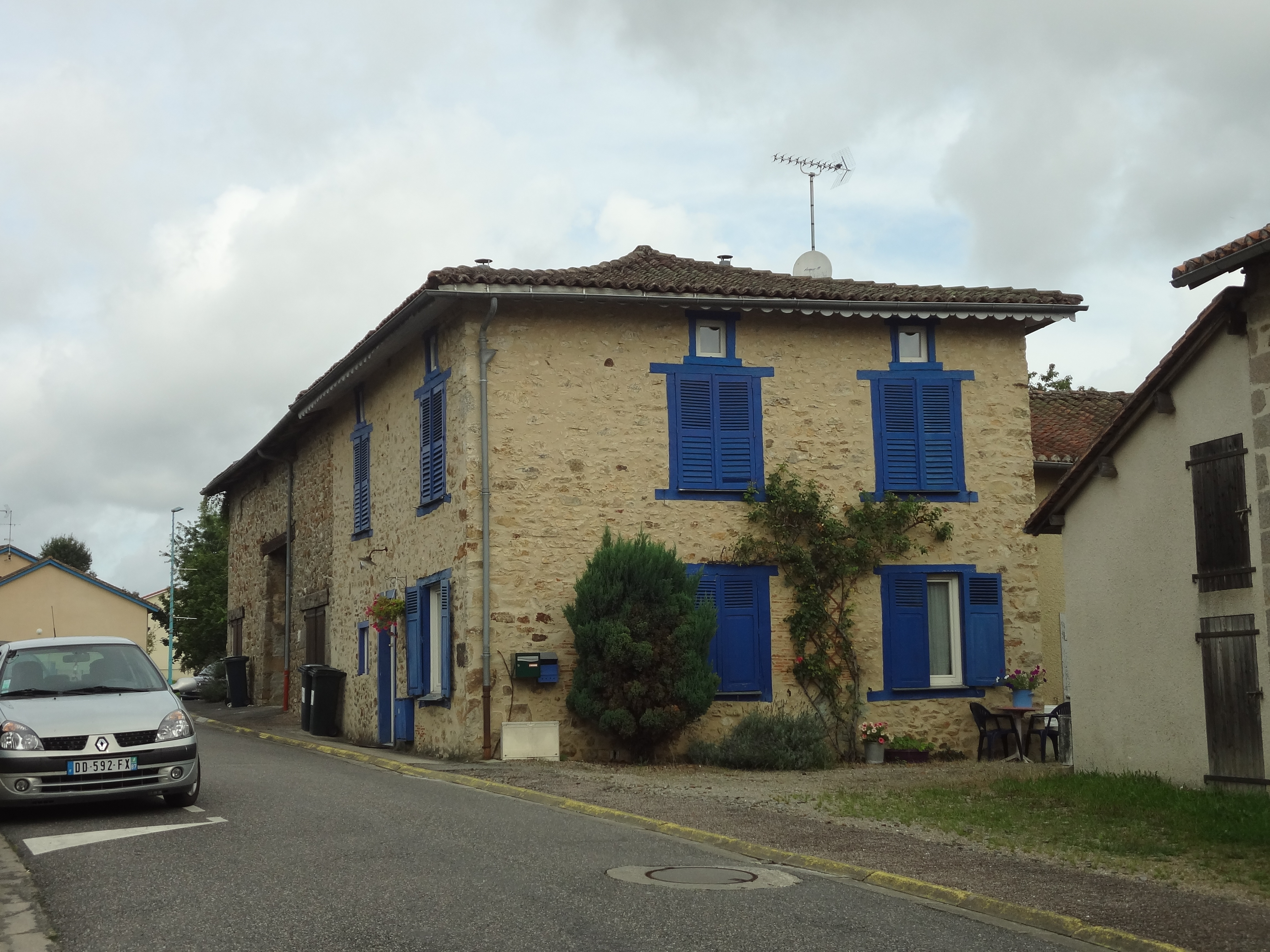 maison bleue